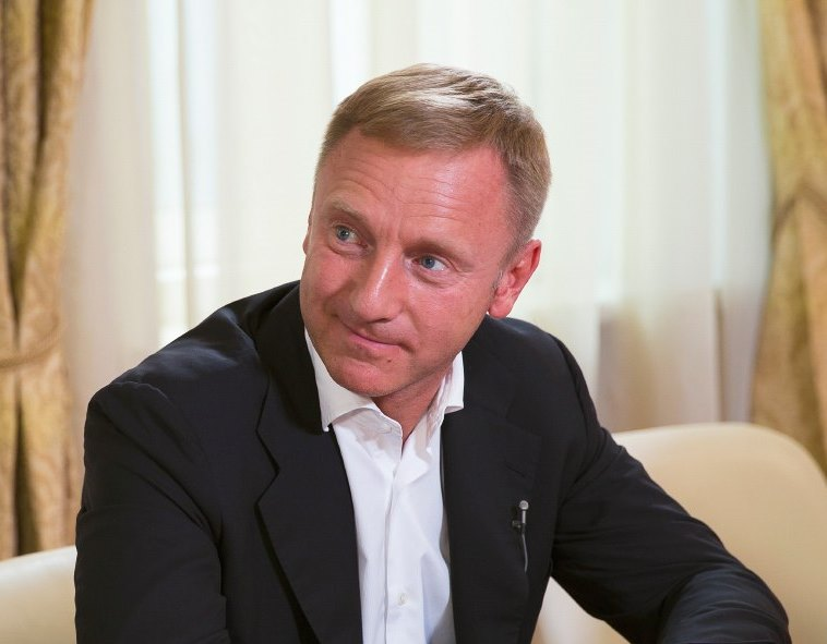 Дмитрий Викторович Ливанов